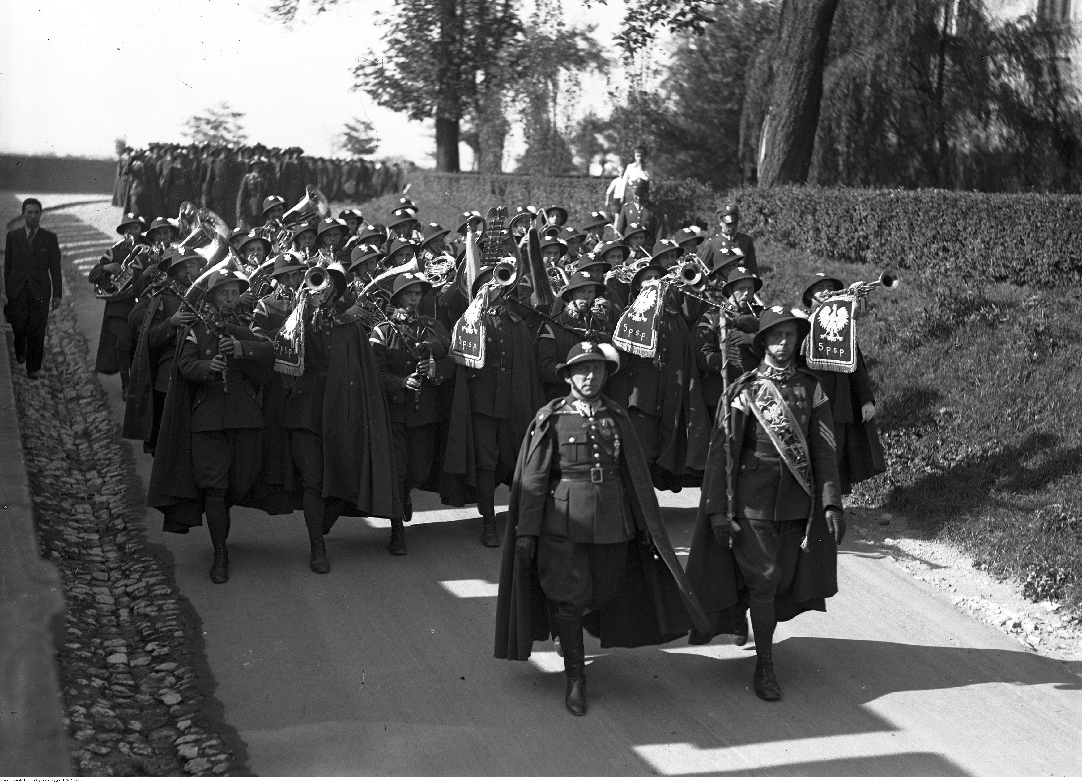 Wizyta 5 Pułku Strzelców Podhalańskich w Krakowie - orkiestra pułkowa w marszu; październik 1935 r. Koncern Ilustrowany Kurier Codzienny - Archiwum Ilustracji. Sygnatura: 1-W-1322-3